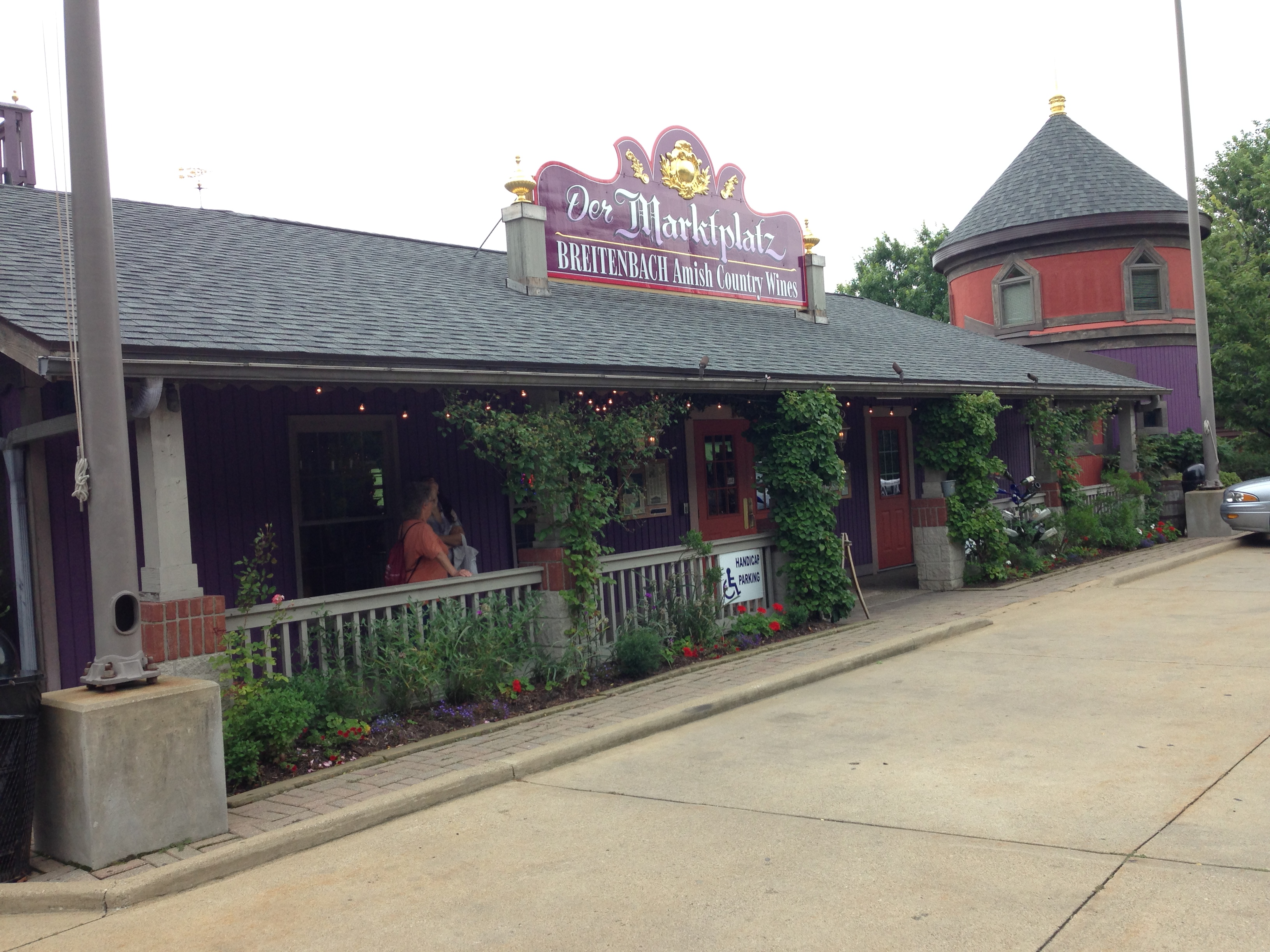 Breitenbach Wine Cellars, 5934 Old Route 39 Northwest, Dover, Ohio